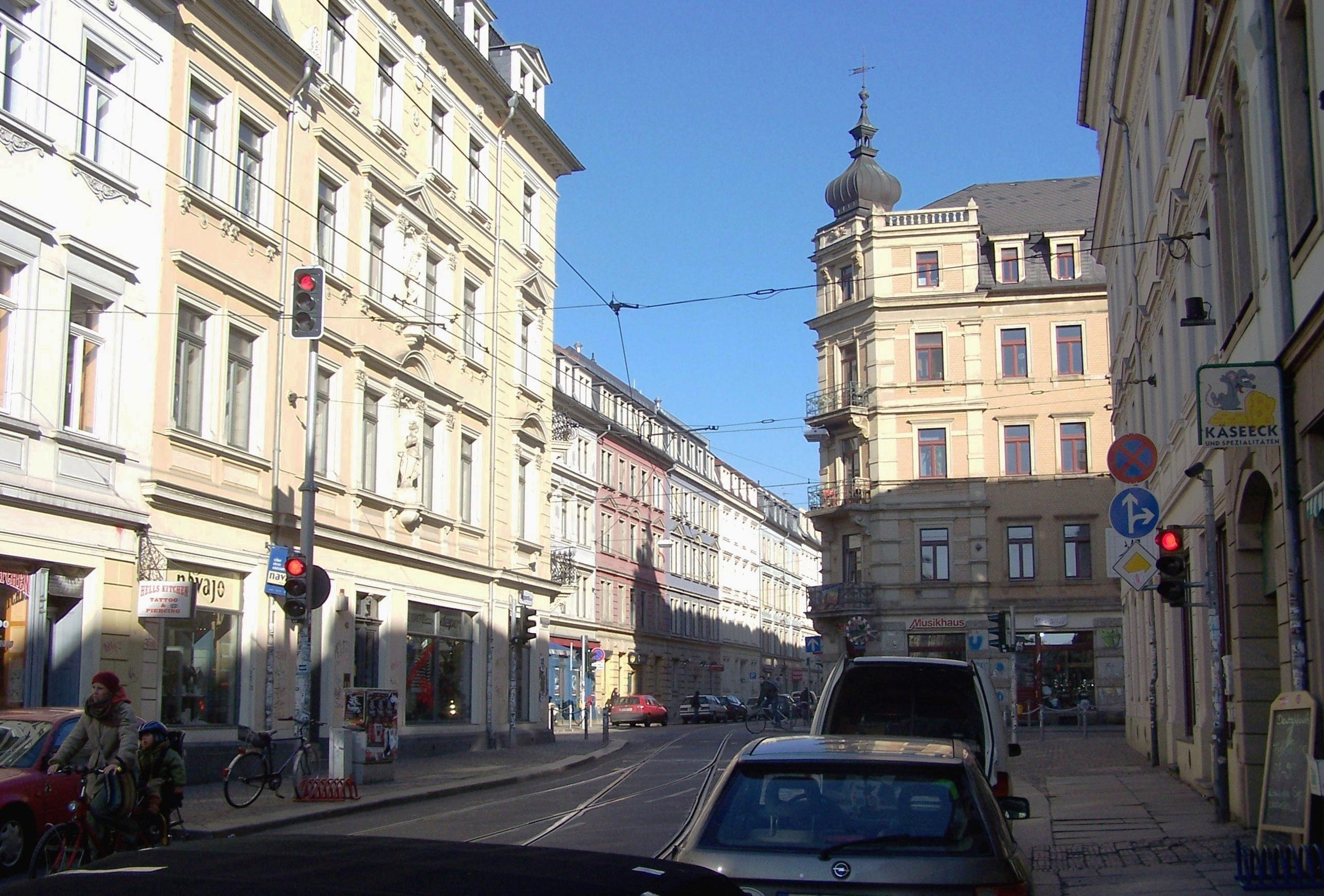 Kreuzung Rothenburger/Ecke Louisenstraße in Dresdens Äußerer Neustadt